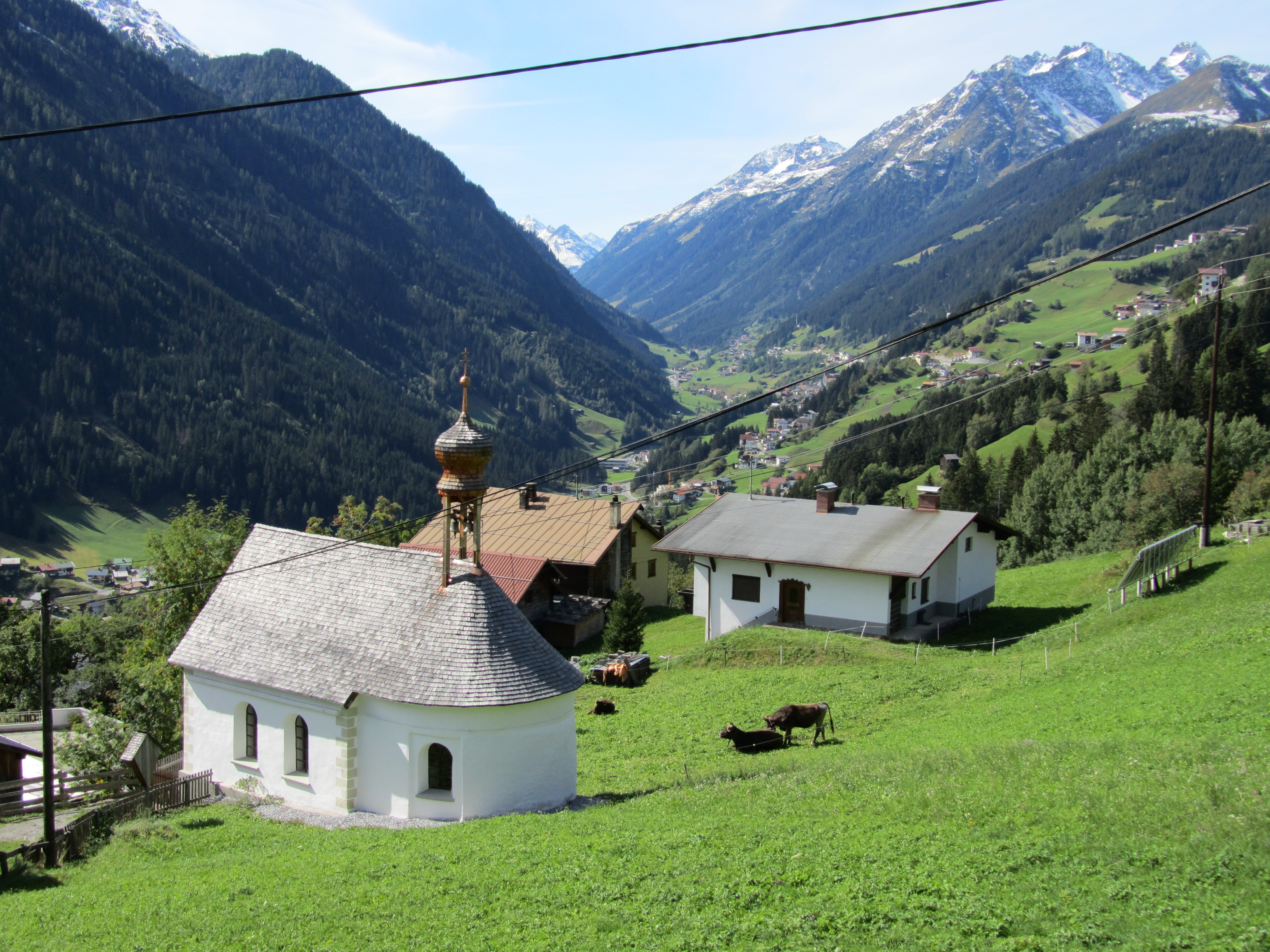 Kapelle Hl. Dreifaltigkeit in Kappl im Bezirk Landeck, Tirol